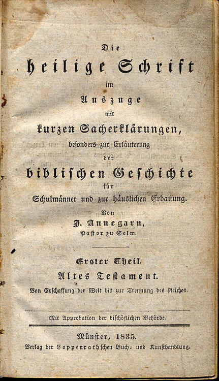 Titelseite eines Buchs von Annegarn